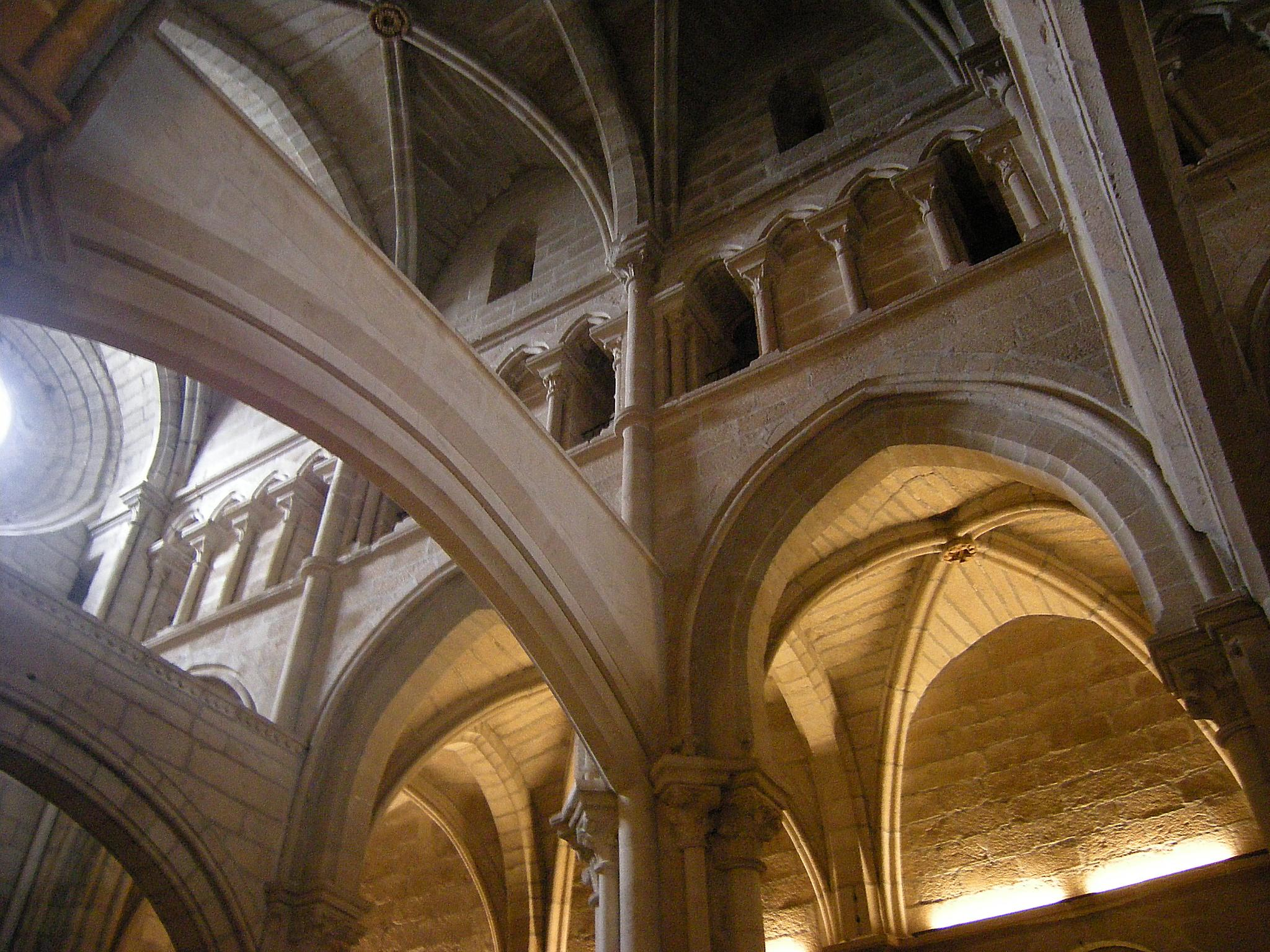 Interior de la Catedral de Tui.